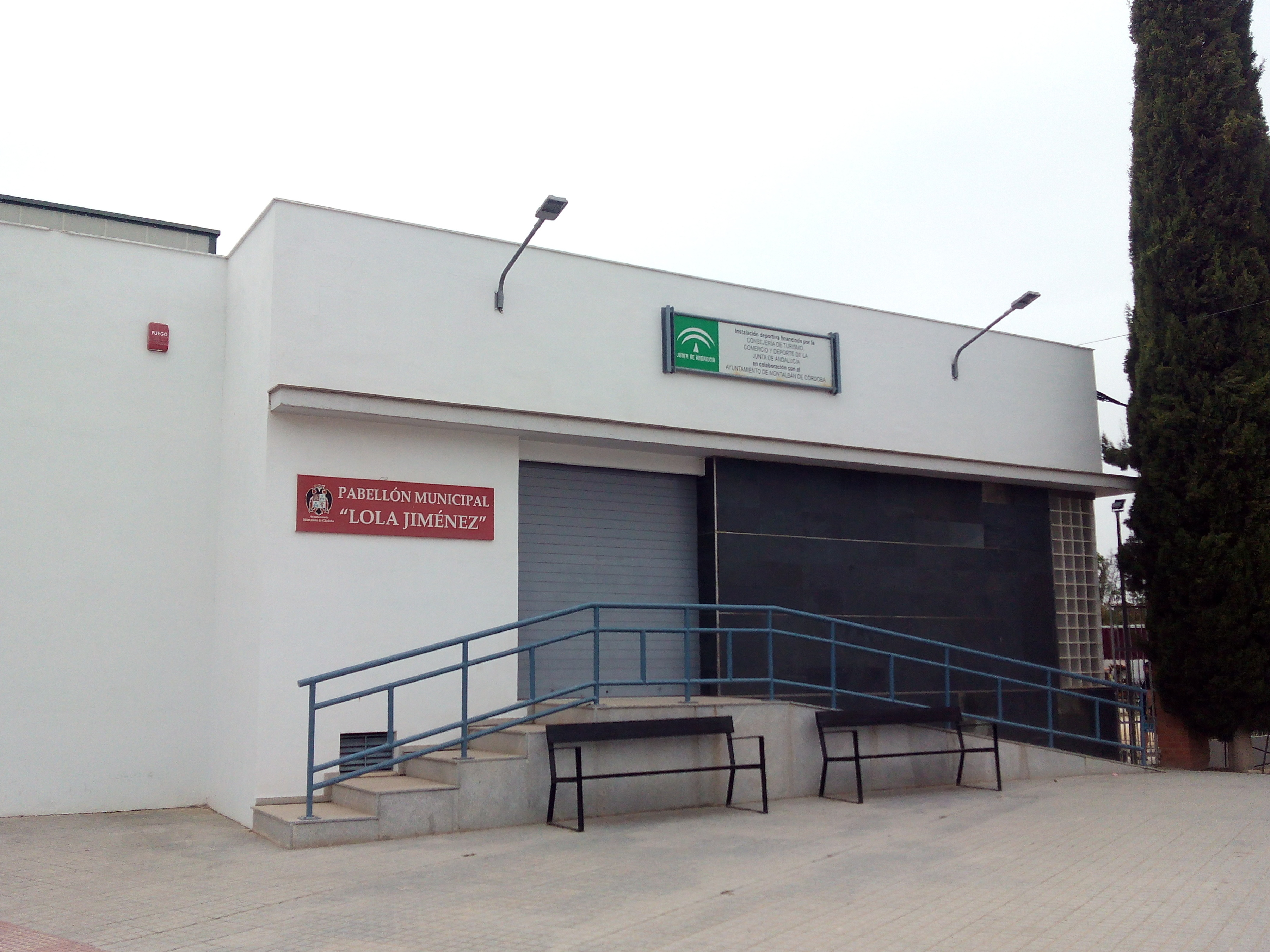 Pabellón Municipal "Lola Jiménez", Montalbán de Córdoba (España).